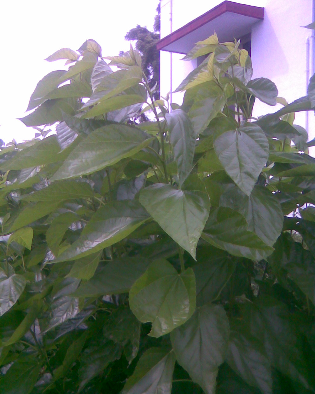 The variety released by Central Sericultural Research & Training Institute, Central Silk Board, Manandawadi Road, Srirampura, Mysore - 570 008. during 1997, yields about 60 MT/ha/year.